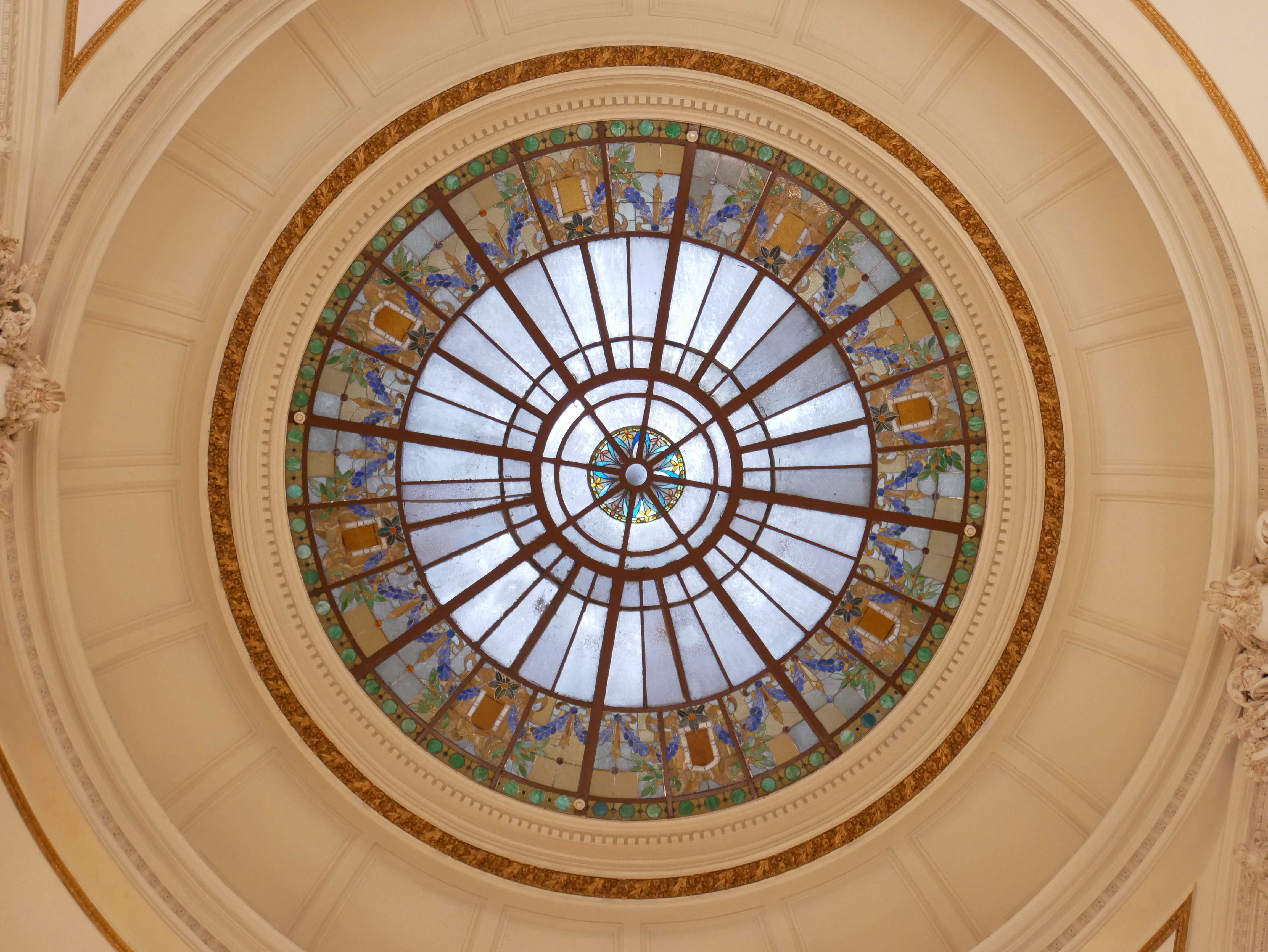 中文（台灣）: 國立臺灣博物館大廳花窗玻璃穹頂，臺北市中正區城內次分區黎明里